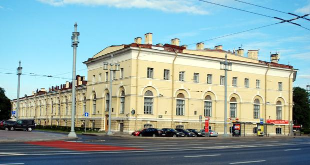 Часть биржевого комплекса, занимающего практически всю стрелку Васильевского острова в Санкт-Петербурге.